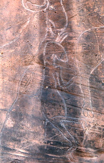 Gravures préhistoriques de la région dEl Bayadh, Algérie